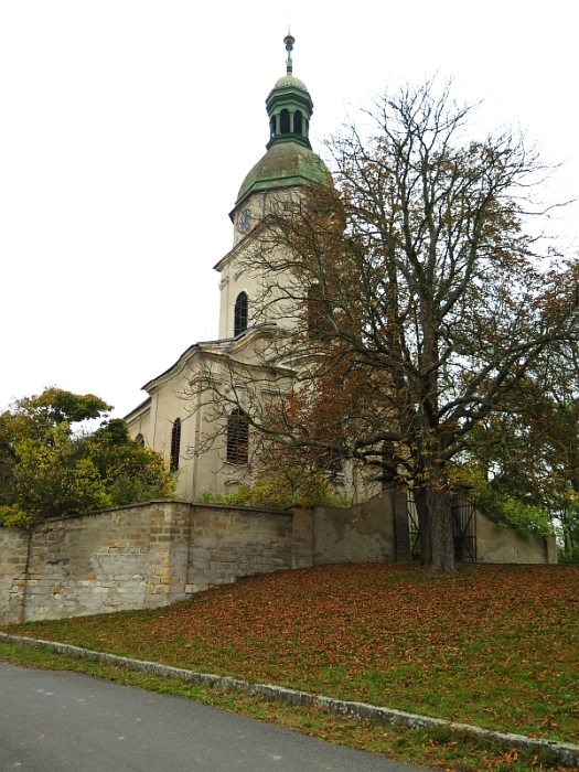 Kostel svatého Václava, náves, Žitovlice.